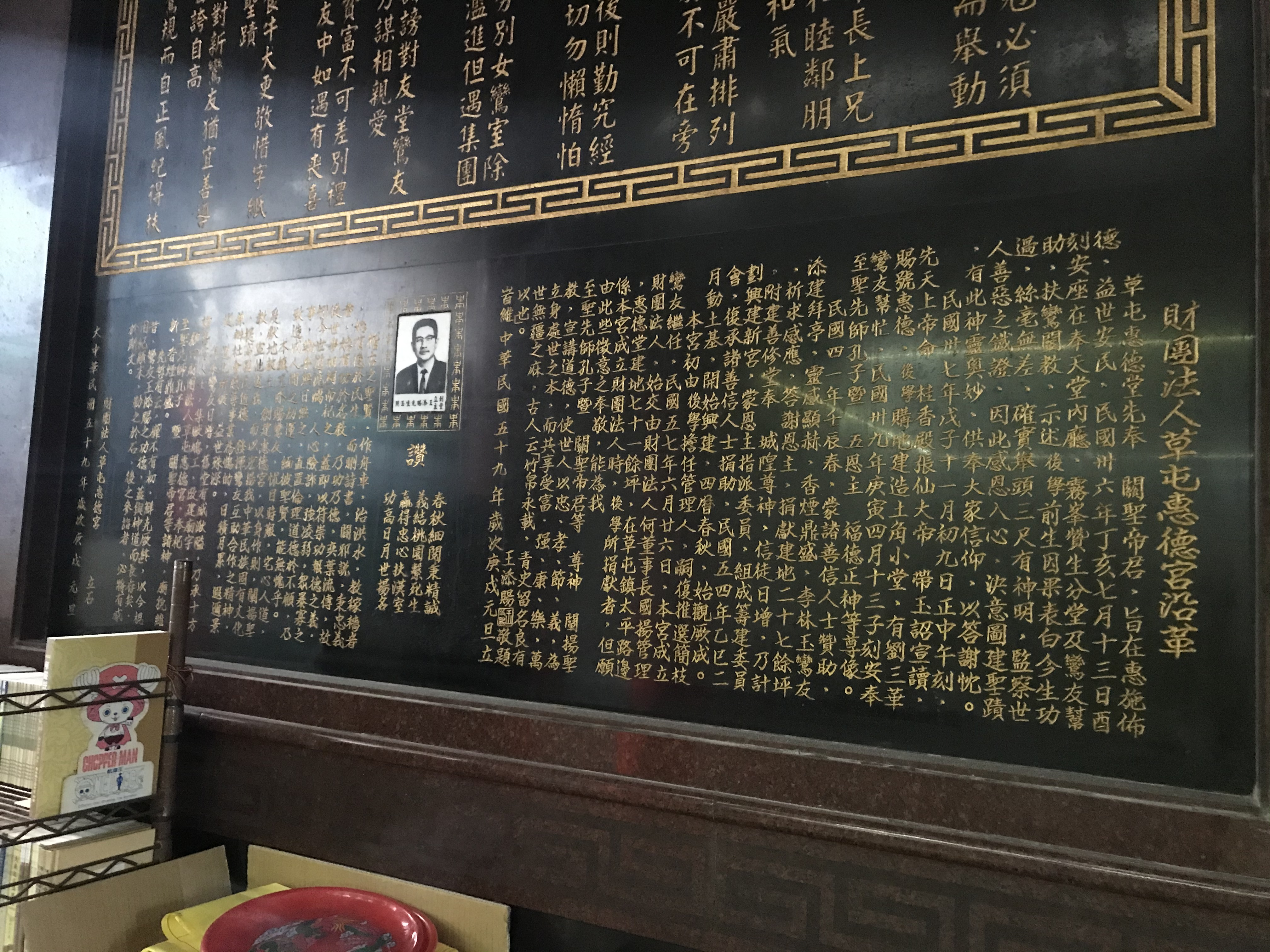 草屯惠德宮沿革